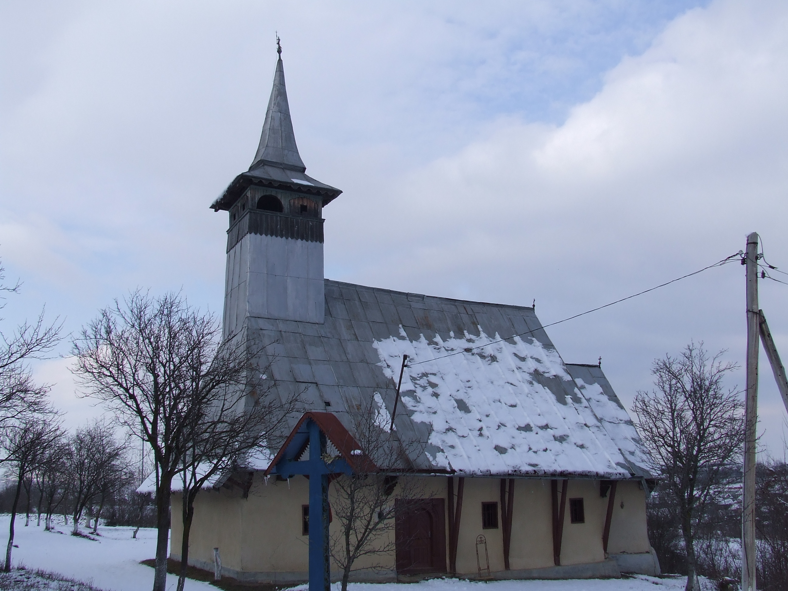 Biserica de lemn din Bădeni, judeţul Cluj.